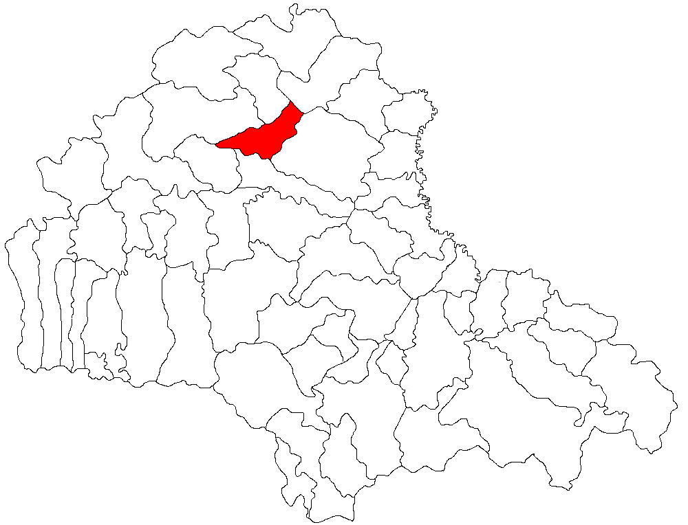 Categorie:Hărţi ale judeţului Braşov